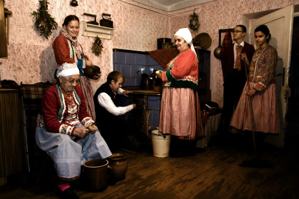 Członkowie Zespołu Regionalnego Pieśni i Tańca Wilamowice w strojach codziennych.